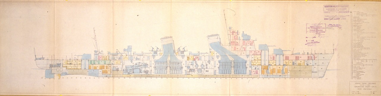 Disegno della sezione longitudinale dell'esploratore veloce "Tashkent", costruito dal Cantiere Odero Terni Orlando di Livorno per la Marina Militare Sovietica, 8 febbraio 1936 (AS Livorno, Archivio storico del Cantiere navale Luigi Orlando)